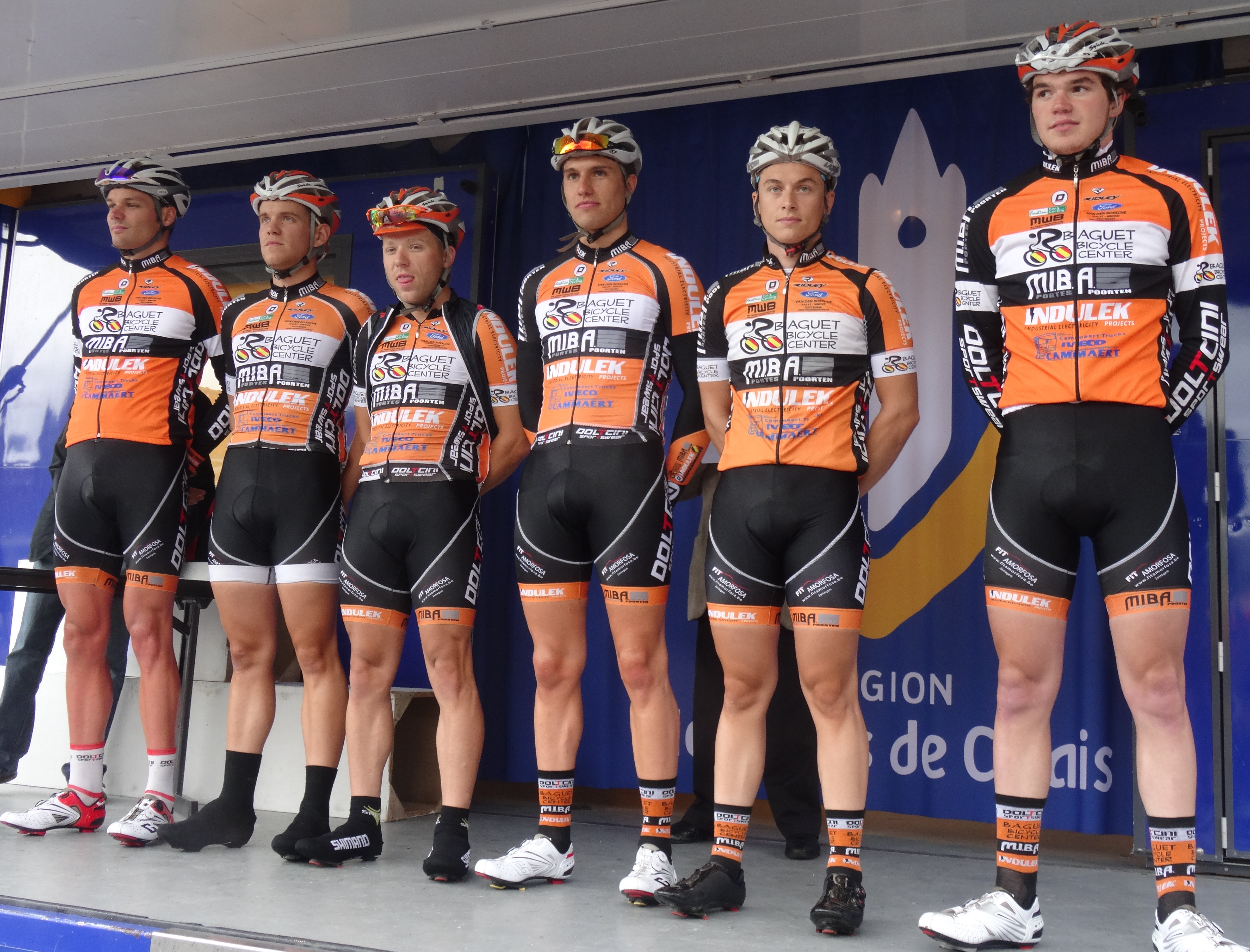 Reportage photographique réalisé le dimanche 13 juillet à l'occasion du départ et de l'arrivée de la Ronde pévéloise 2014 à Pont-à-Marcq, Nord-Pas-de-Calais, France.